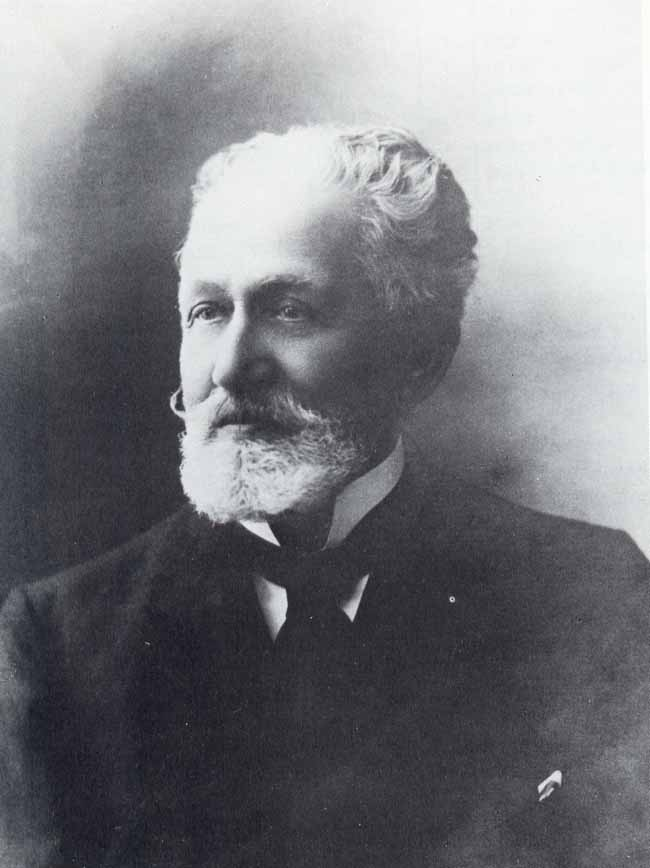 Cesare Saldini